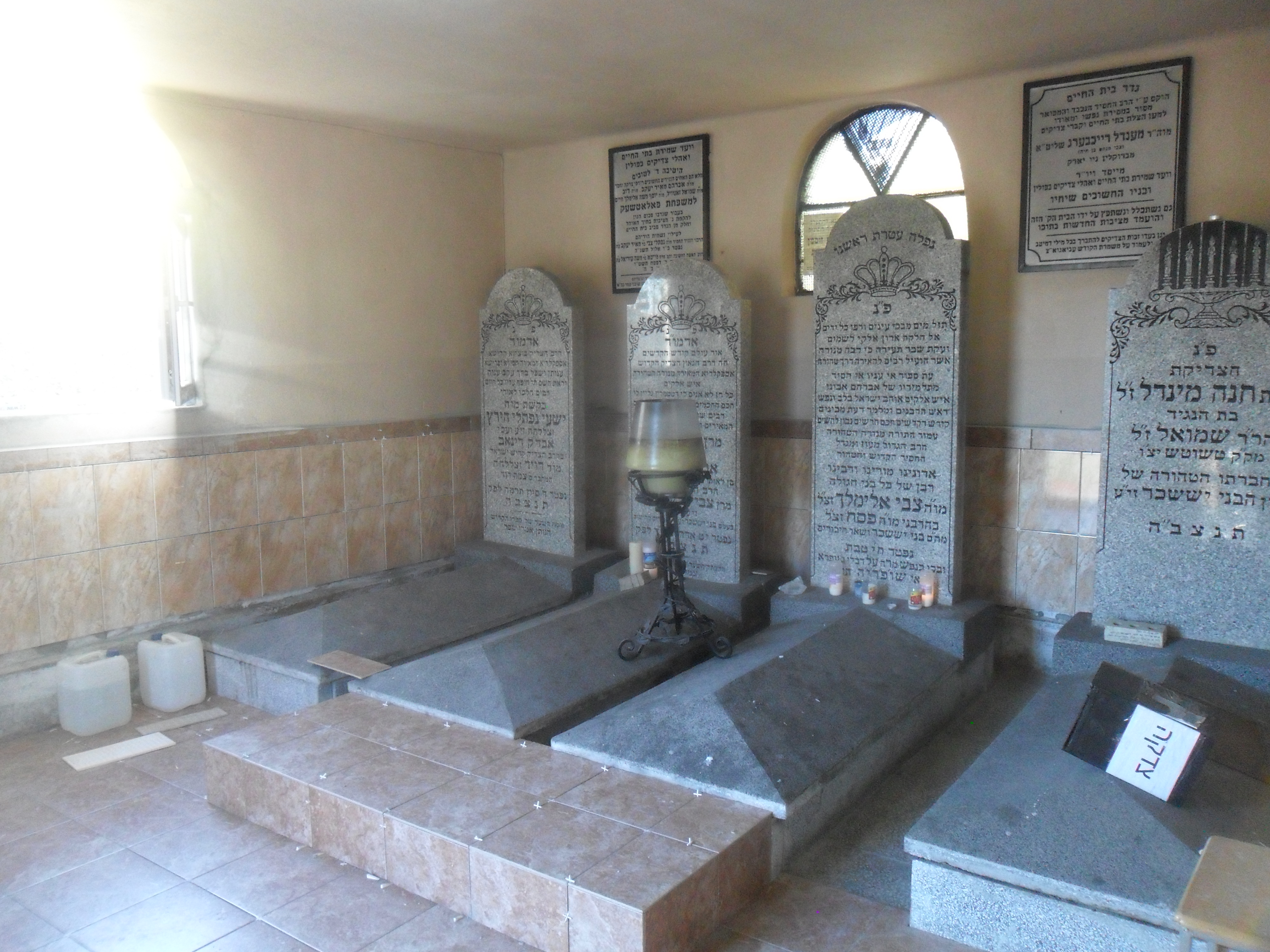 רבי דינוב